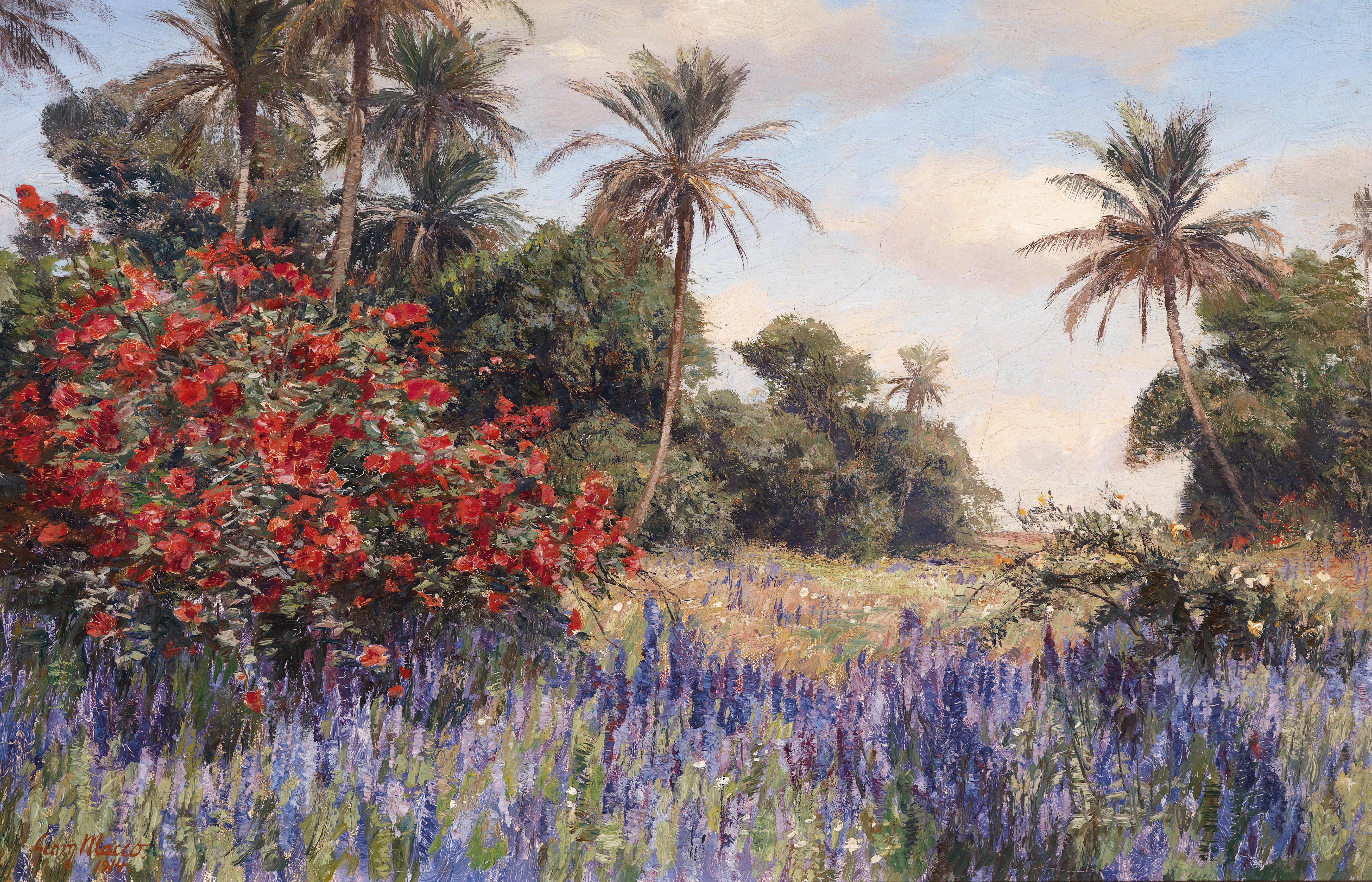 Südliche Landschaft mit Lavendel, signiert, datiert G. Macco 1914, Öl auf Leinwand, 33,5 x 52 cm